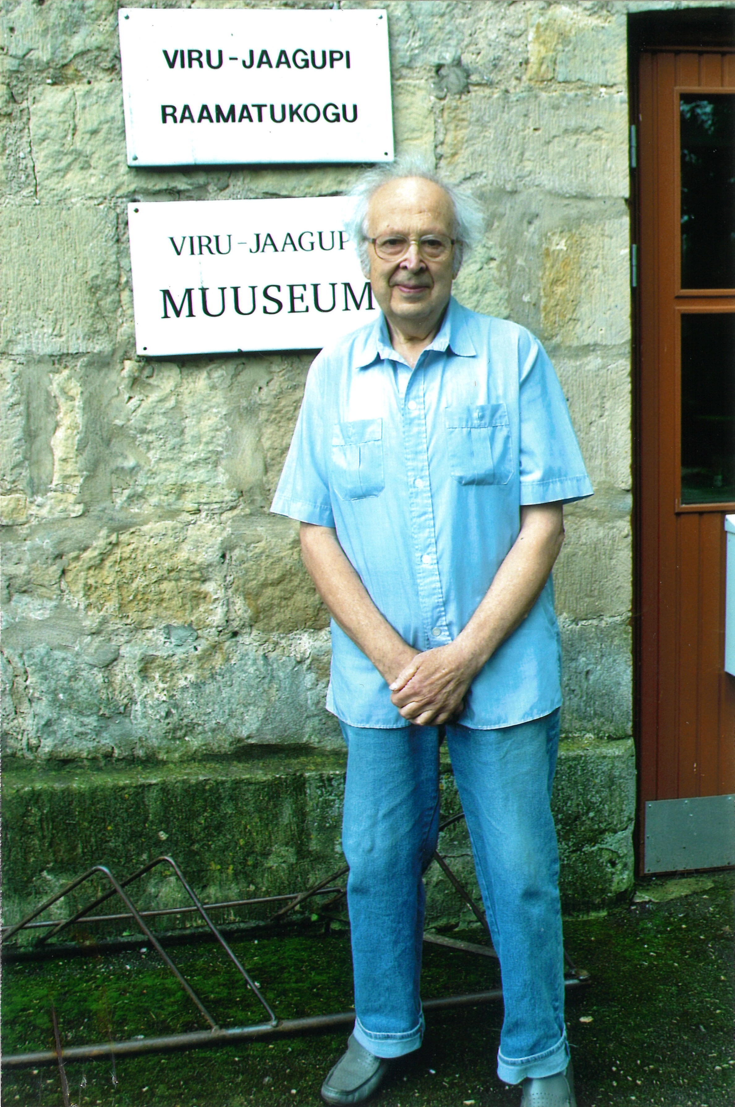 Kalju Lillepuu Viru-Jaagupi endise koolimaja ees 2. augustil 2013 a. Tegemist on külaskäiguga oma kodukohta külla vennale ja õele.